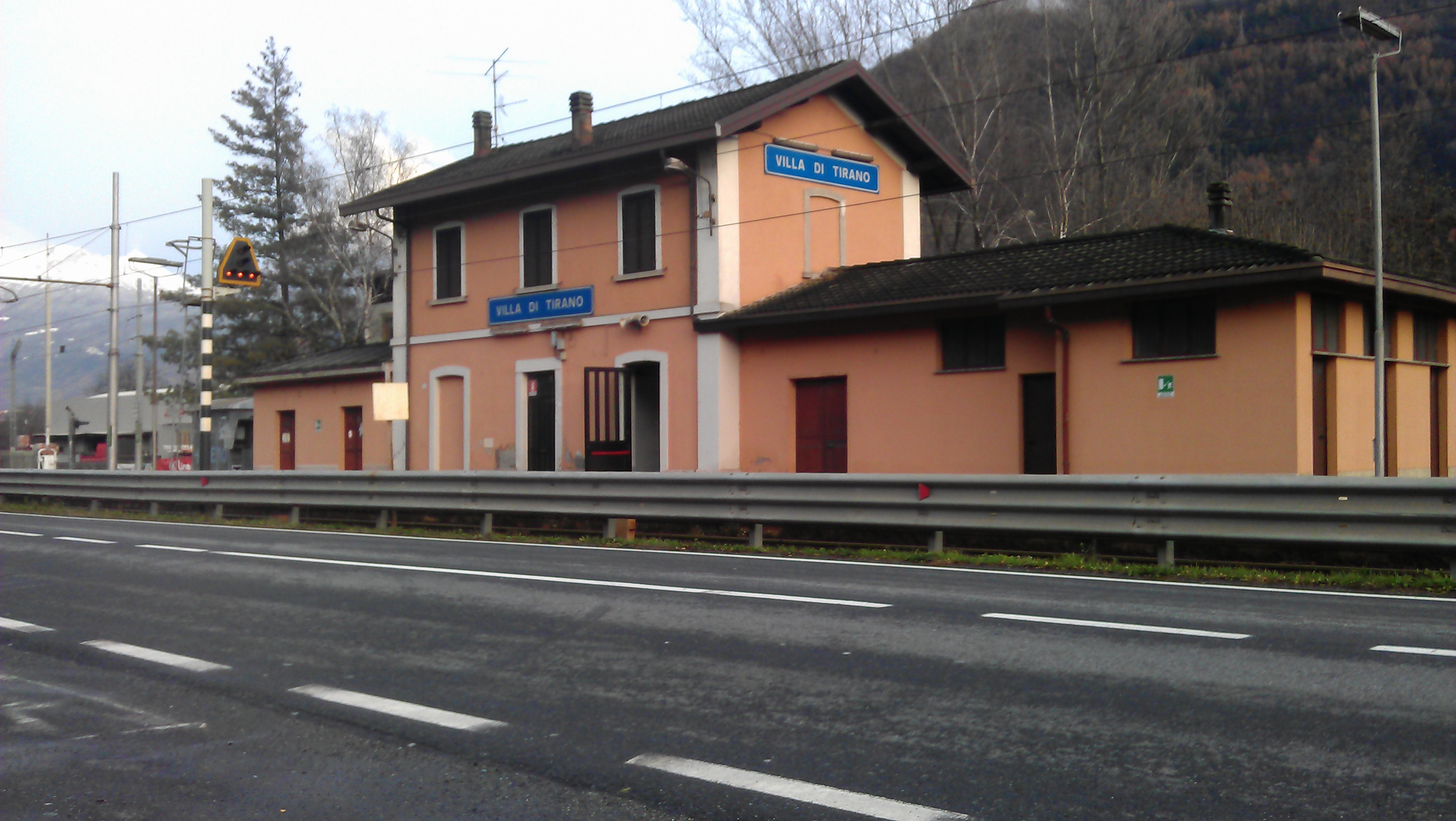 Stazione di Villa di Tirano